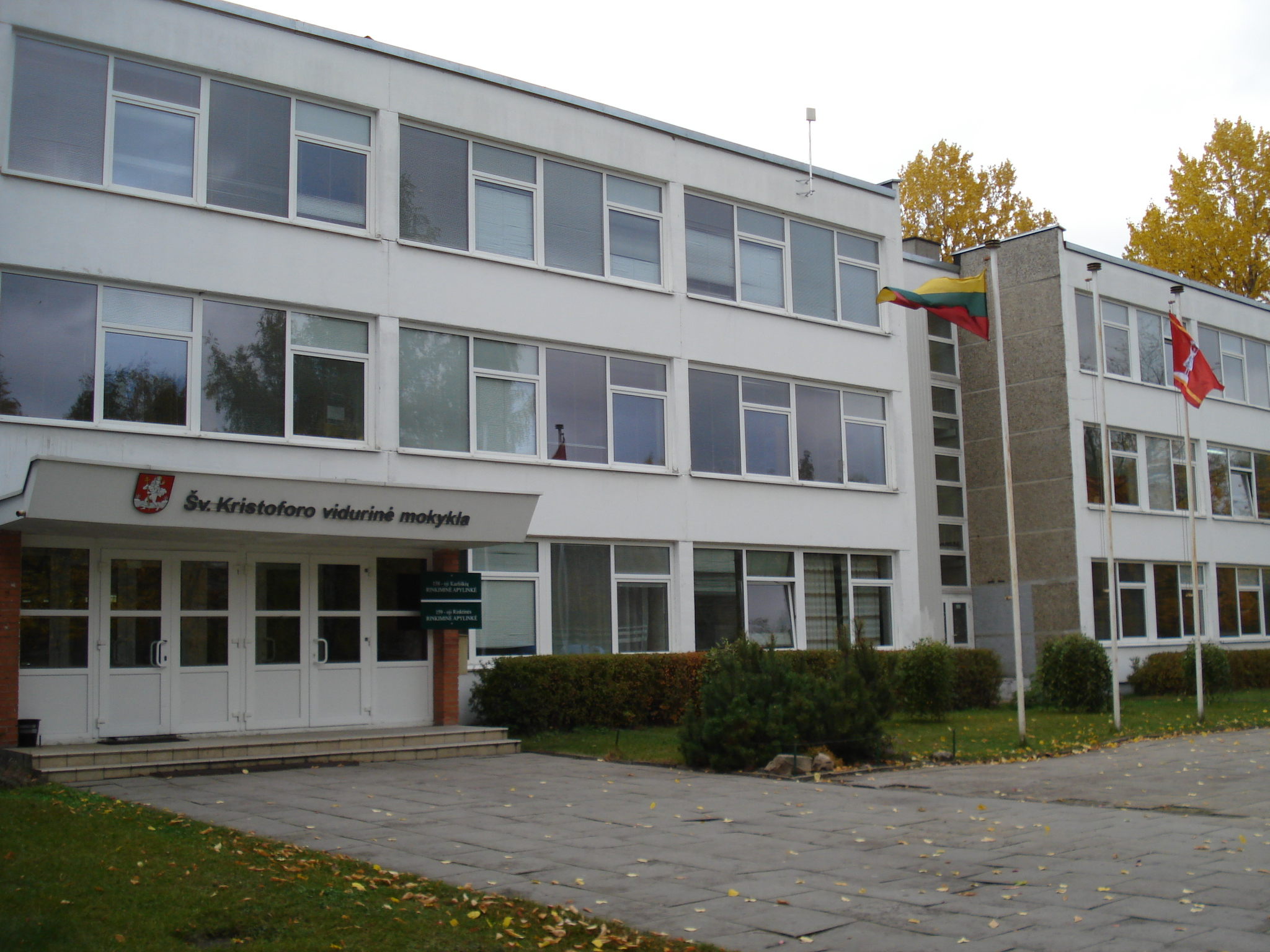 Saint Christopher secondary school in Vilnius. Kazliškių gatvė 4